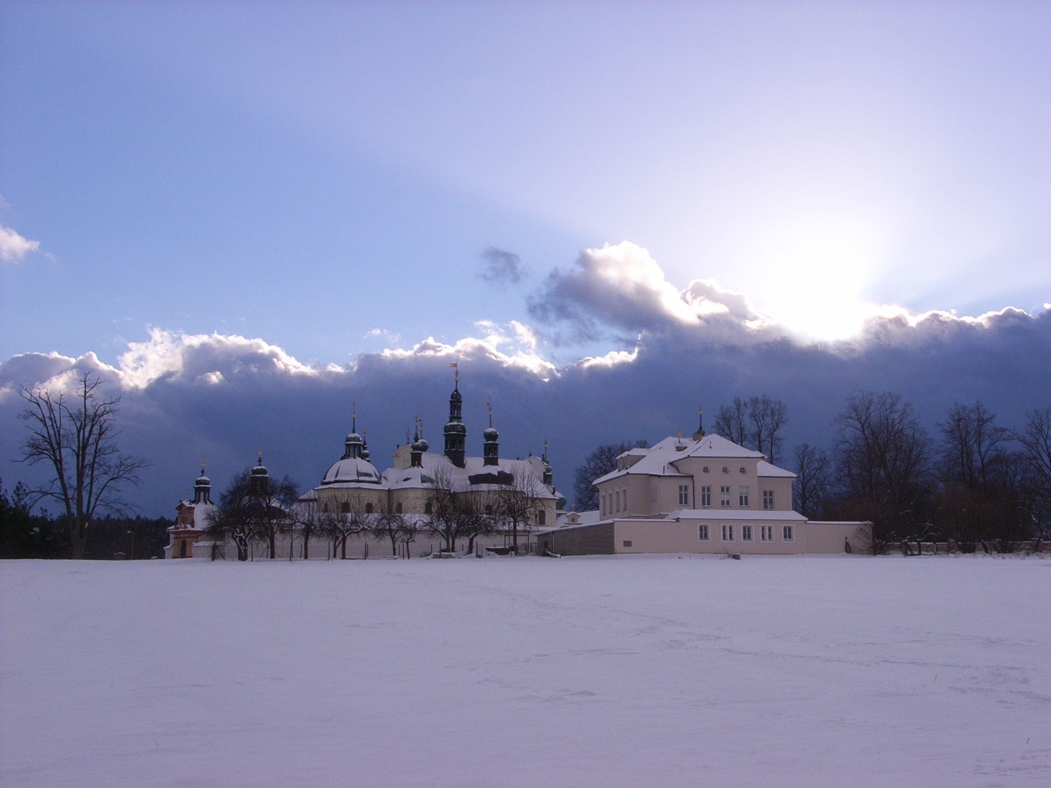 Klokoty (Tábor), klášter,poutní místo